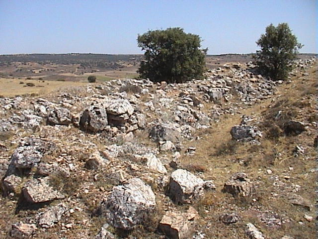 Restos de la muralla de piedra de la antigua ciudad celtíbera de La Cerca (posterior asentamiento, campamento, romano). El yacimiento se halla en el paraje conocido como "Las Navas", municipio de Anguita (pertenece, por mitad, a los pueblos de Anguita y de Aguilar de Anguita).